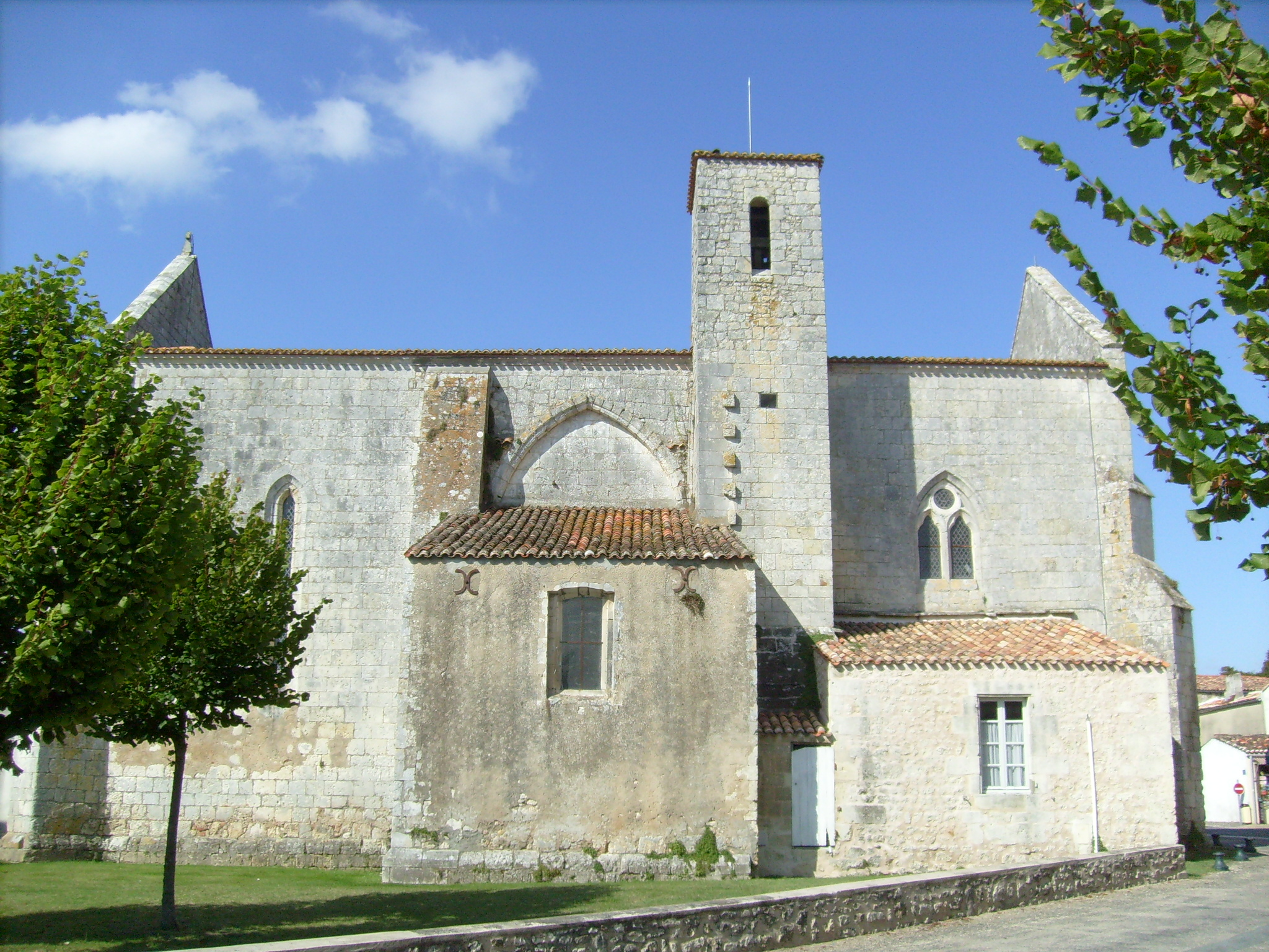 L'église de Nancras